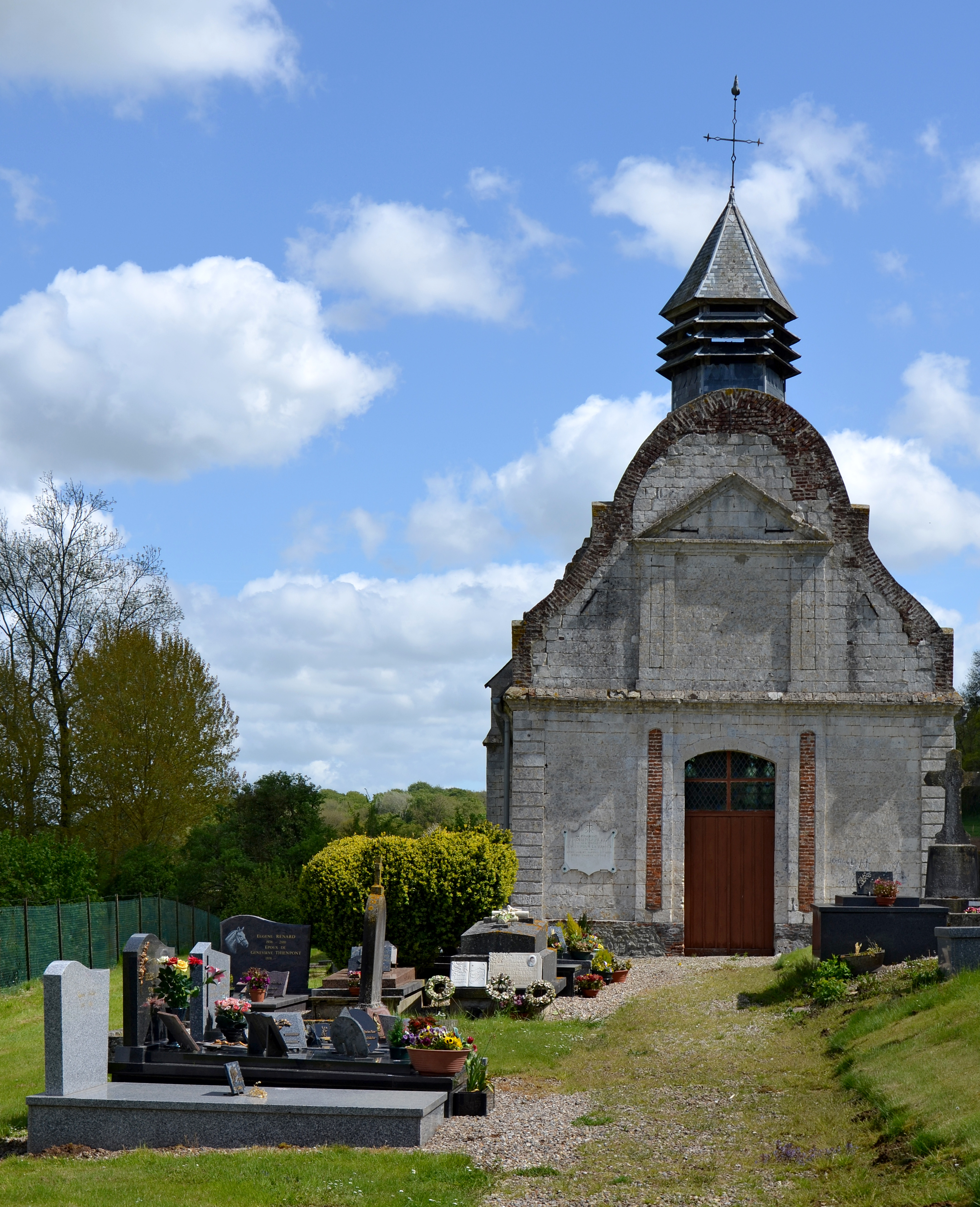 Eglise St Pierre de Frohen le Petit à Frohen sur Authie, Somme, France .